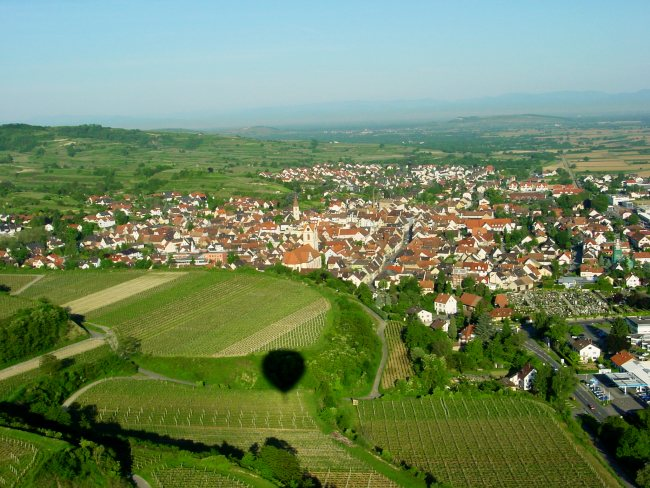 Luftbild von Endingen aufgenommen bei einer Ballonfahrt.